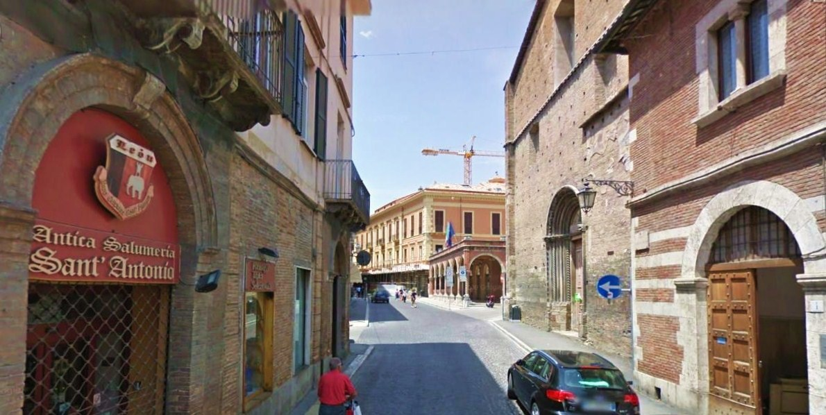 Corso De Michetti - Teramo